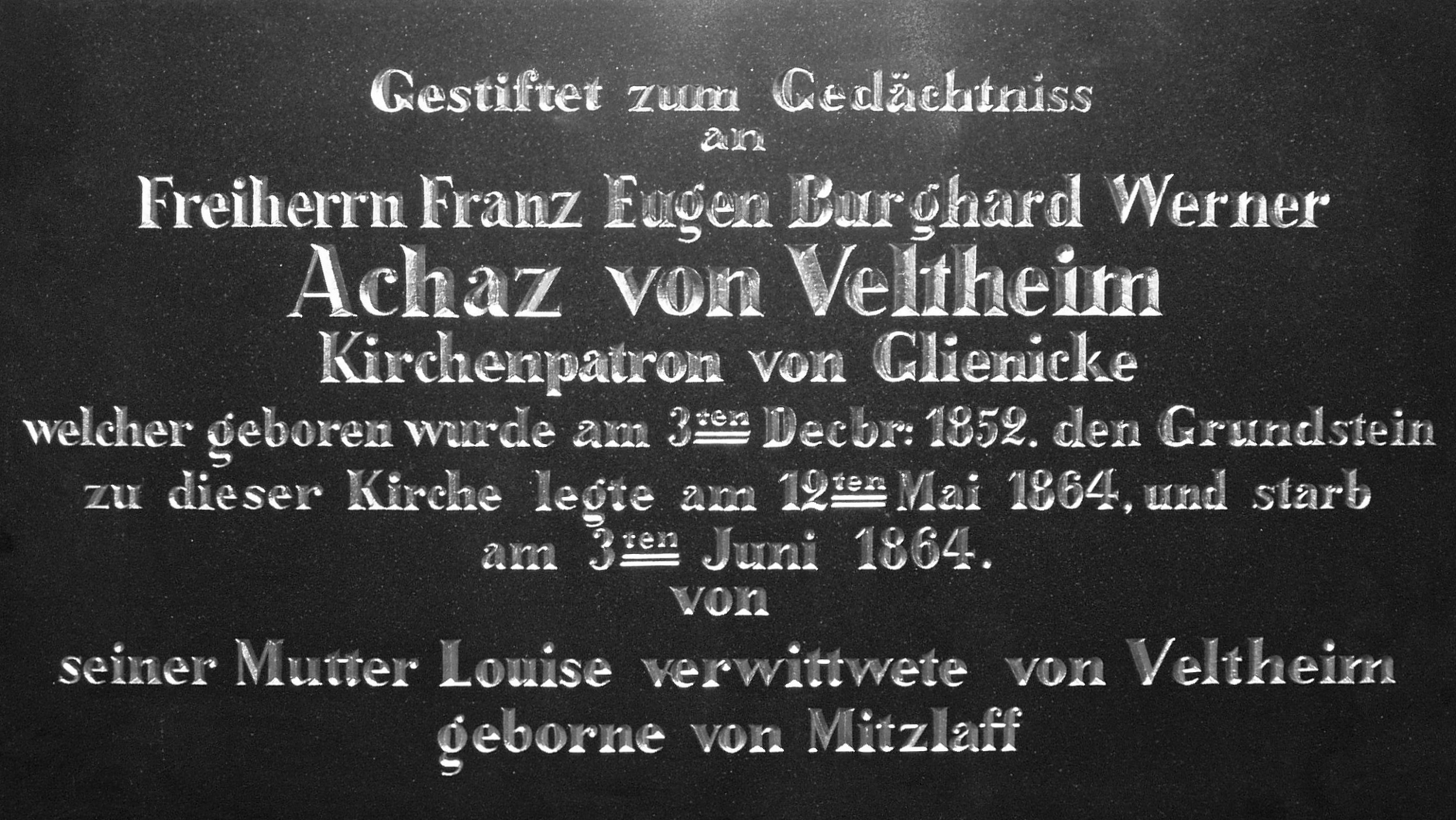 Evangelische Kirchengemeinde Glienicke/Nordbahn: Gedenktafel für Achaz von Veltheim